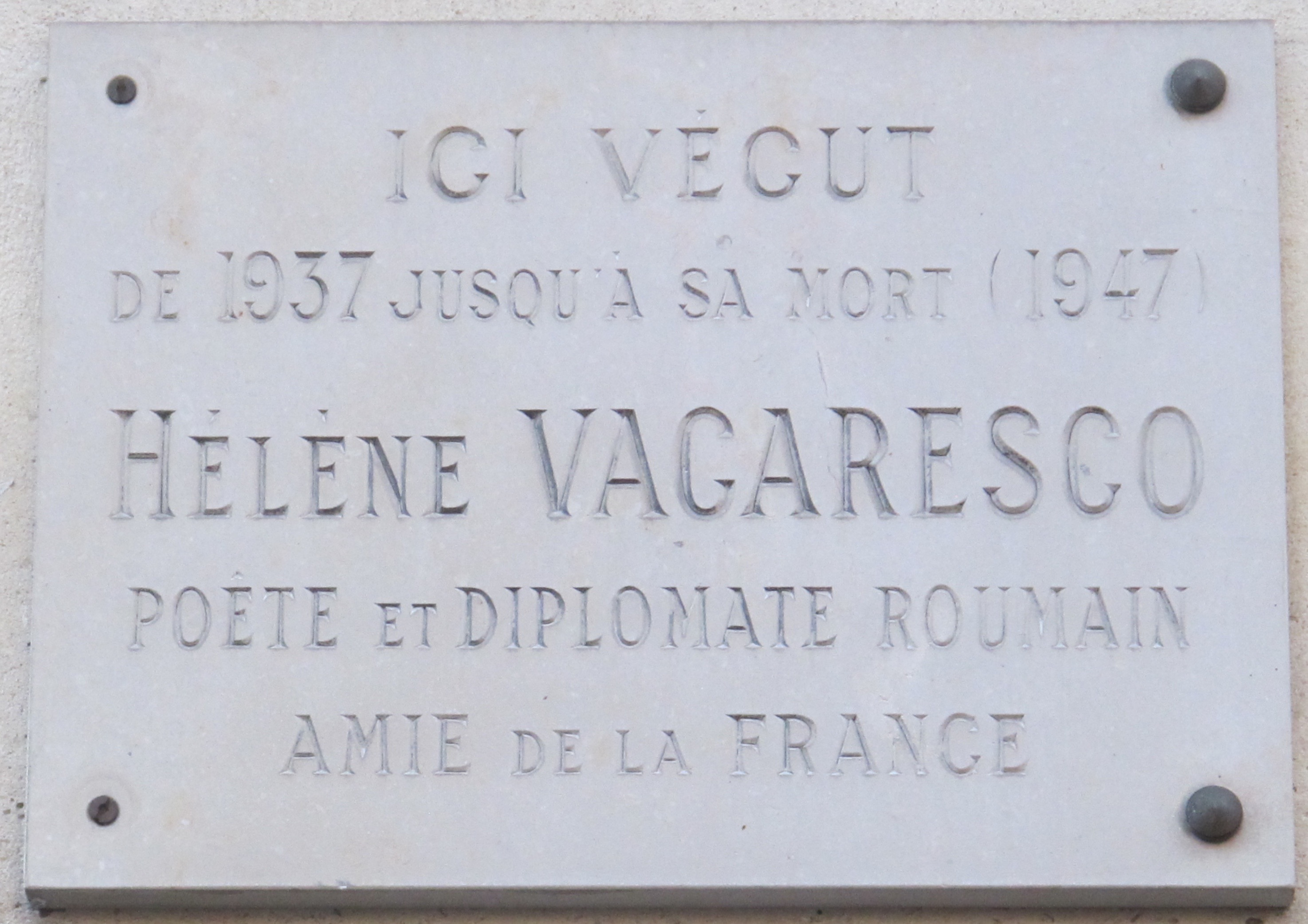 Plaque en hommage à Helene Vacaresco, n°7 rue de Chaillot (Paris, 16e).